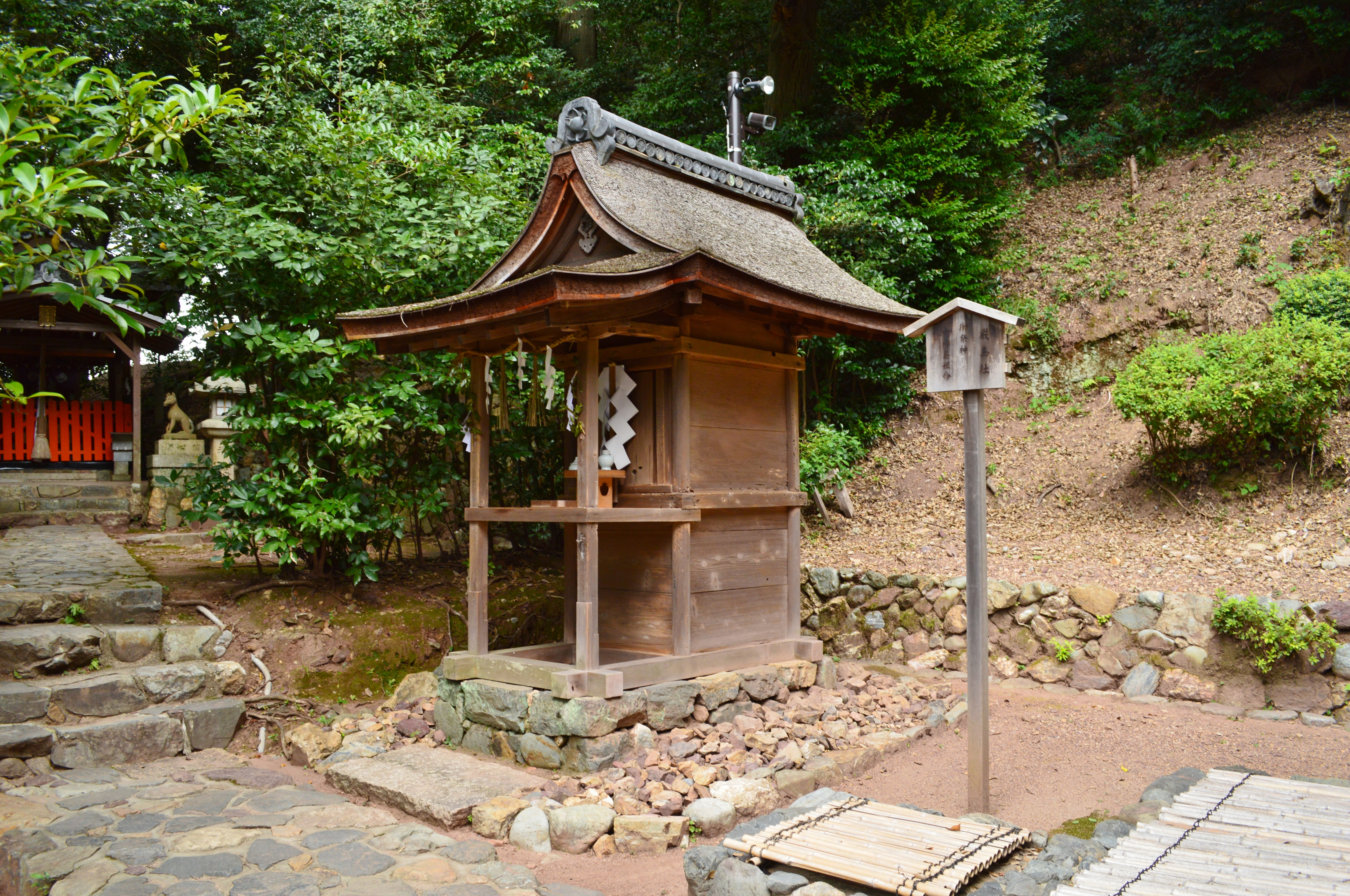 宇治上神社 境内社